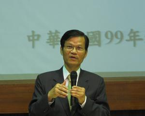 中央研究院院長翁啟惠。